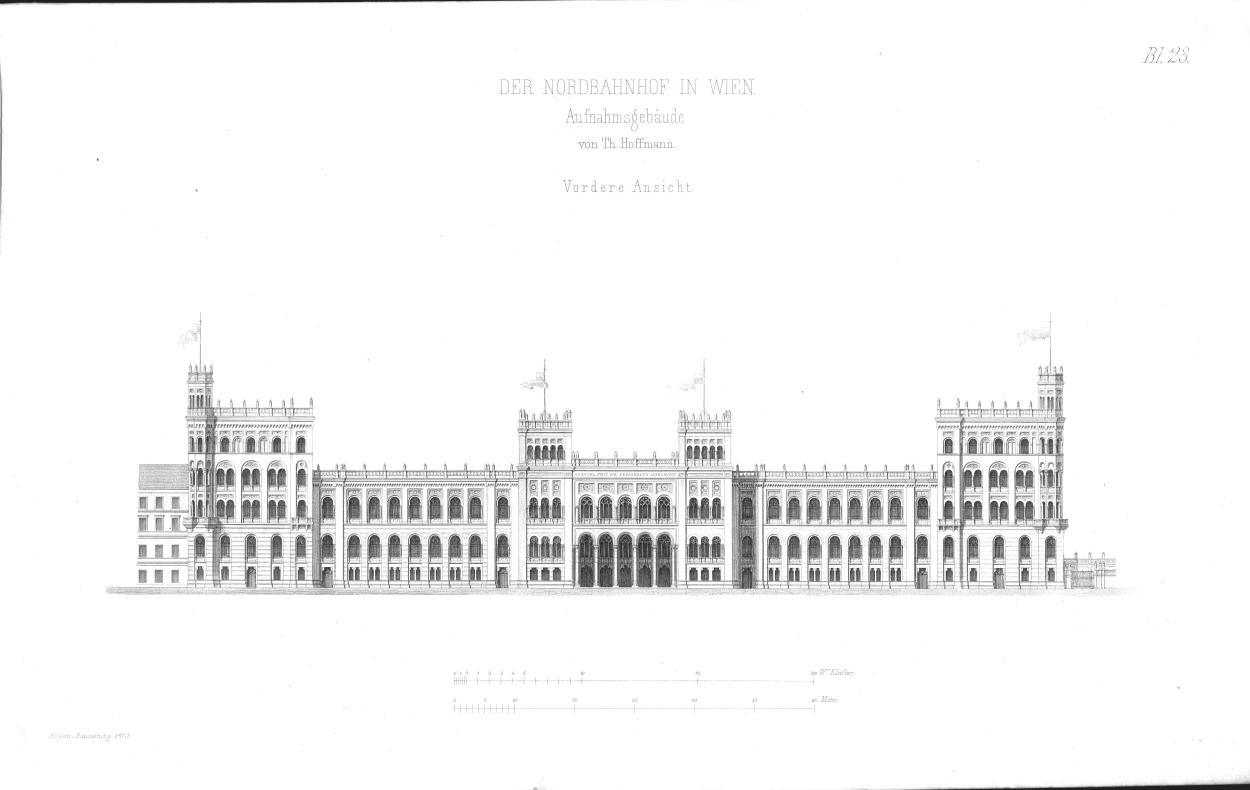 Allgemeine_Bauzeitung_1870_Nordbahnhof